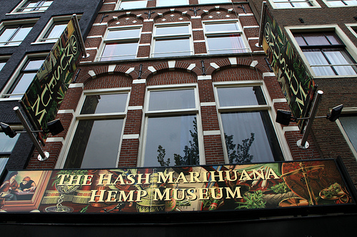 Museo de la Marihuana, Amsterdam